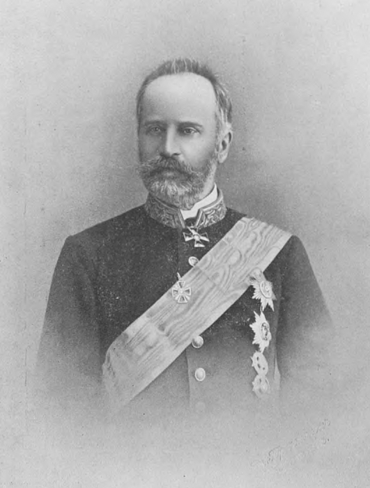 Александр Станиславович Дембовецкий (1840 Российская империя— 1914) — российский государственный деятель, камергер, действительный статский советник, тайный советник, губернатор Могилевской губернии, сенатор, член Правительствующего Сената, согласно легенде сын Александра II.